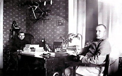 Pohjolan suojeluskuntapiirin päällikkö August Mäkiniemi etualalla ja taustalla kansliapäällikkö Otto Savolainen työhuoneessaan Kemin vanhalla reservikasarmilla 20-luvun alussa.